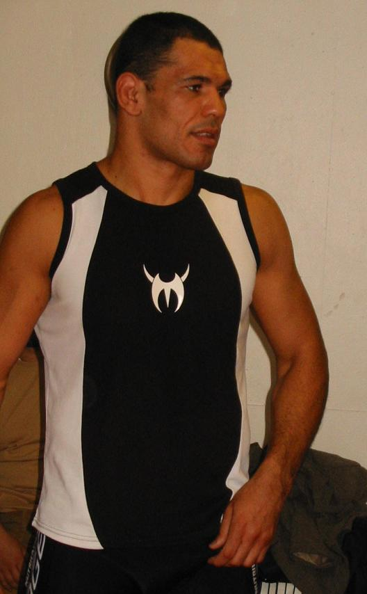 Je suis l'auteur de cette photo, prise lors du stage d'Antonio Rodrigo Nogueira, dit "Minotauro", à Paris en 2004.